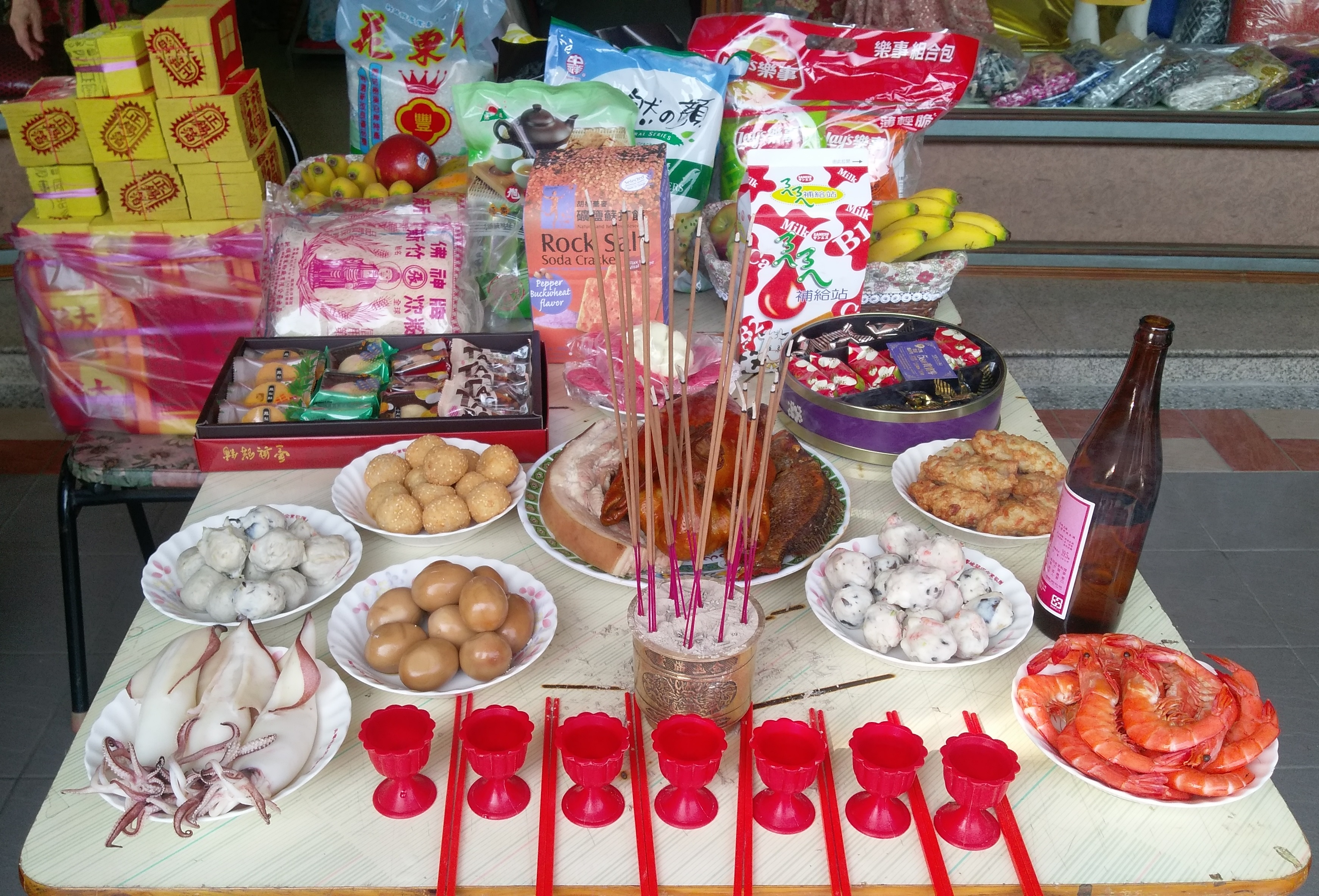 中文（台灣）: 做牙祭拜土地神